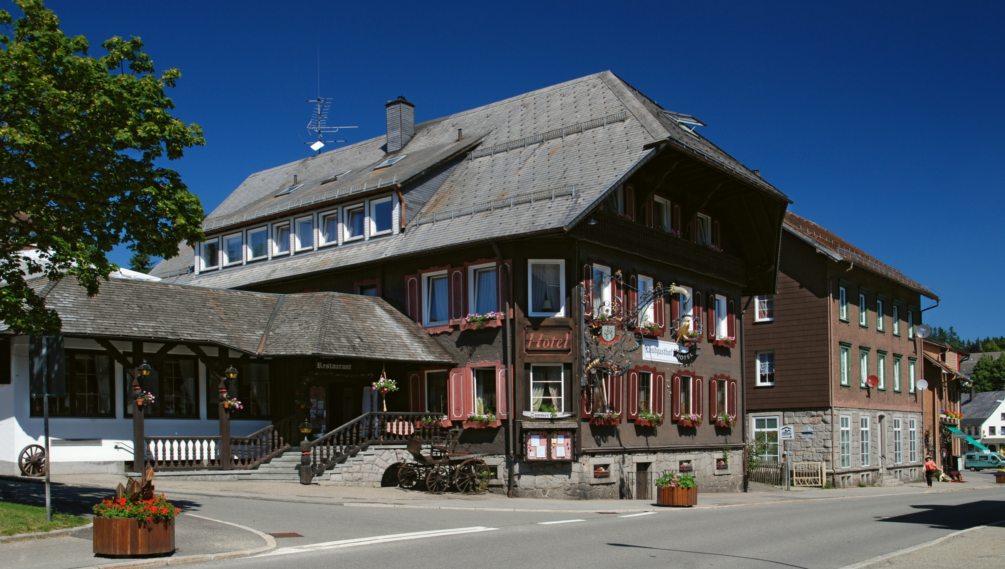 Landgasthof Falken an der Hauptstrasse in Schönwald/Schwarzwald